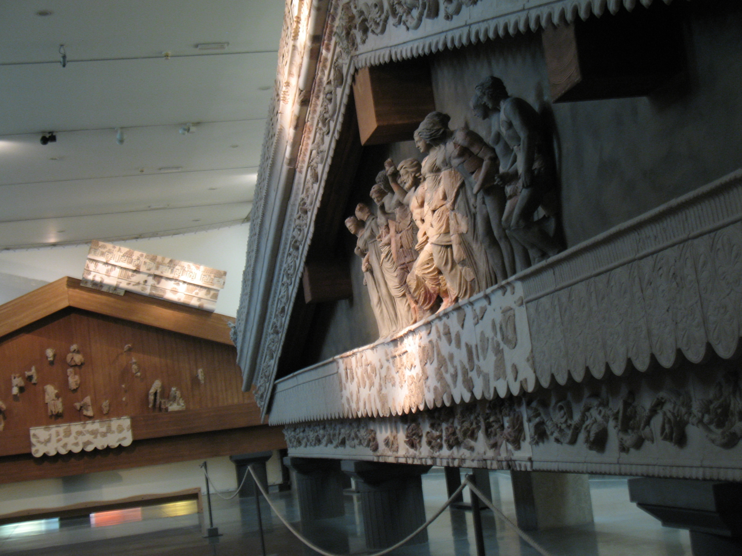 Frontoni parzialmente ricostruiti di templi rinvenuti negli scavi archeologici dell'antica Teate e custoditi nel Museo archeologico La Civitella di Chieti